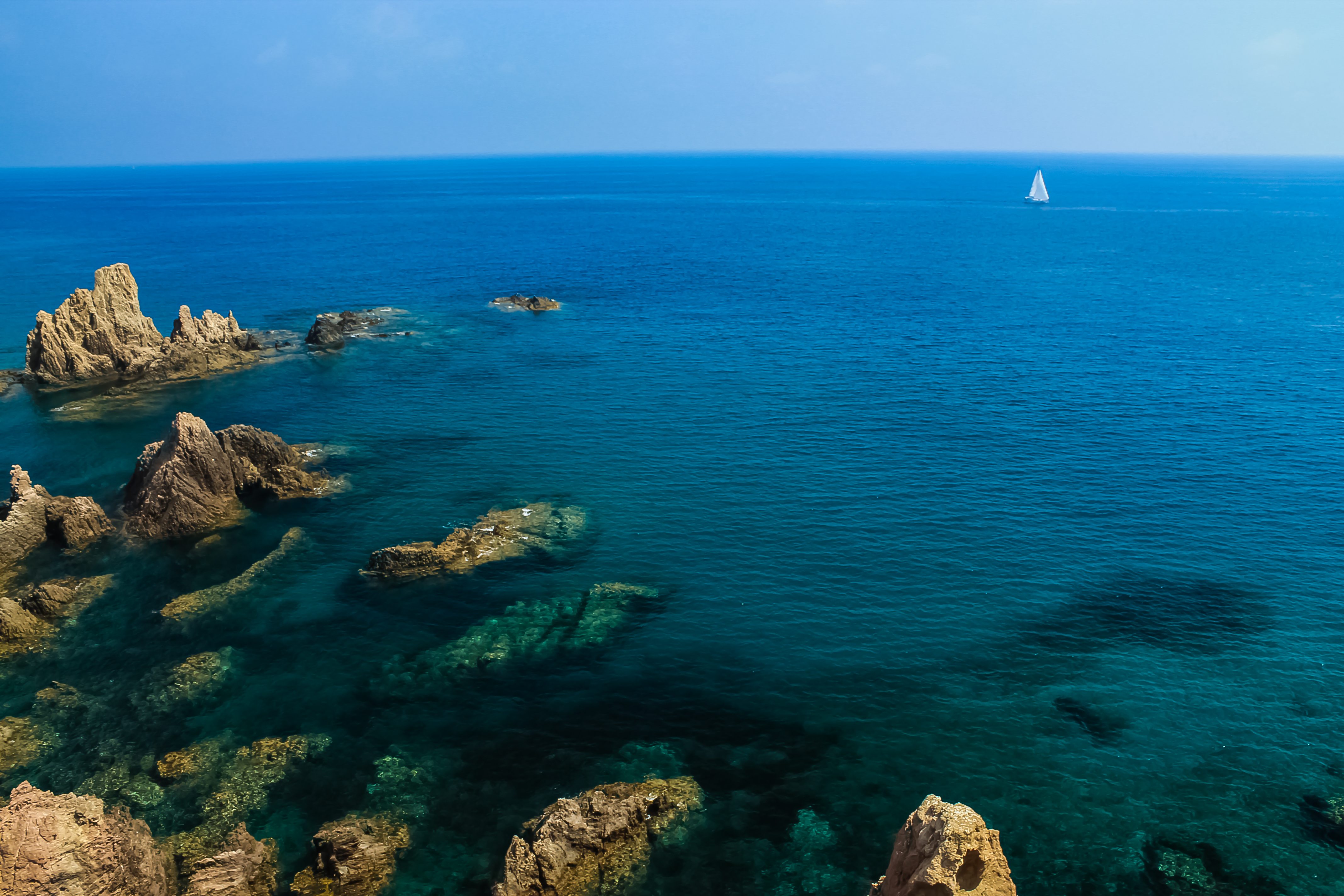 Parque natural del Cabo de Gata-Níjar, vistas del Arrecife de Las Sirenas desde el faro This is a photography of a Special Area of Conservation in Spain with the ID: ES0000046. Natura2000 entry, EEA entry